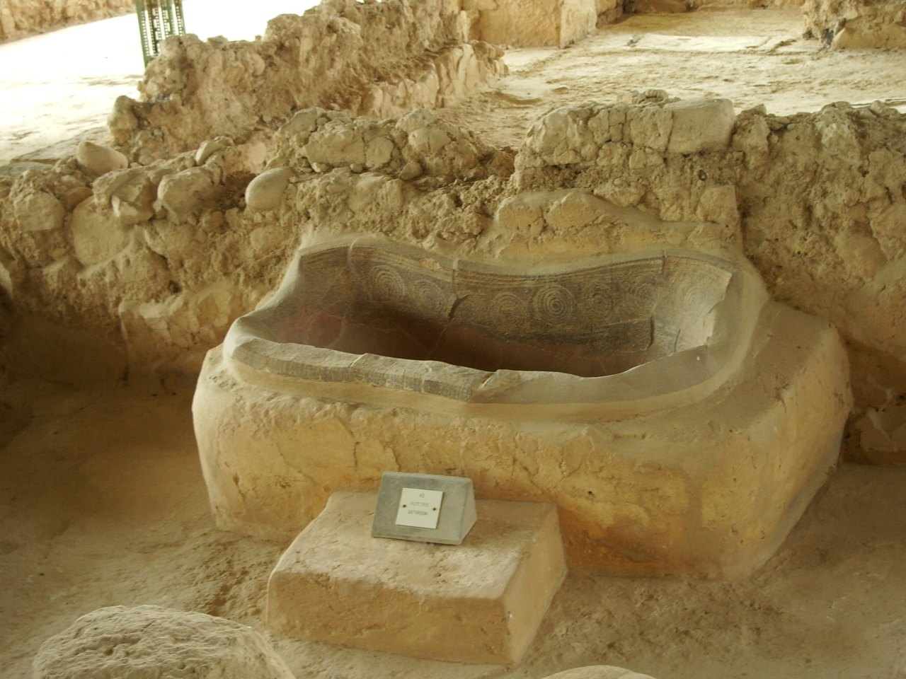 Badewanne in der Ausgrabungsstätte "Palast des Nestor" in Messenien.